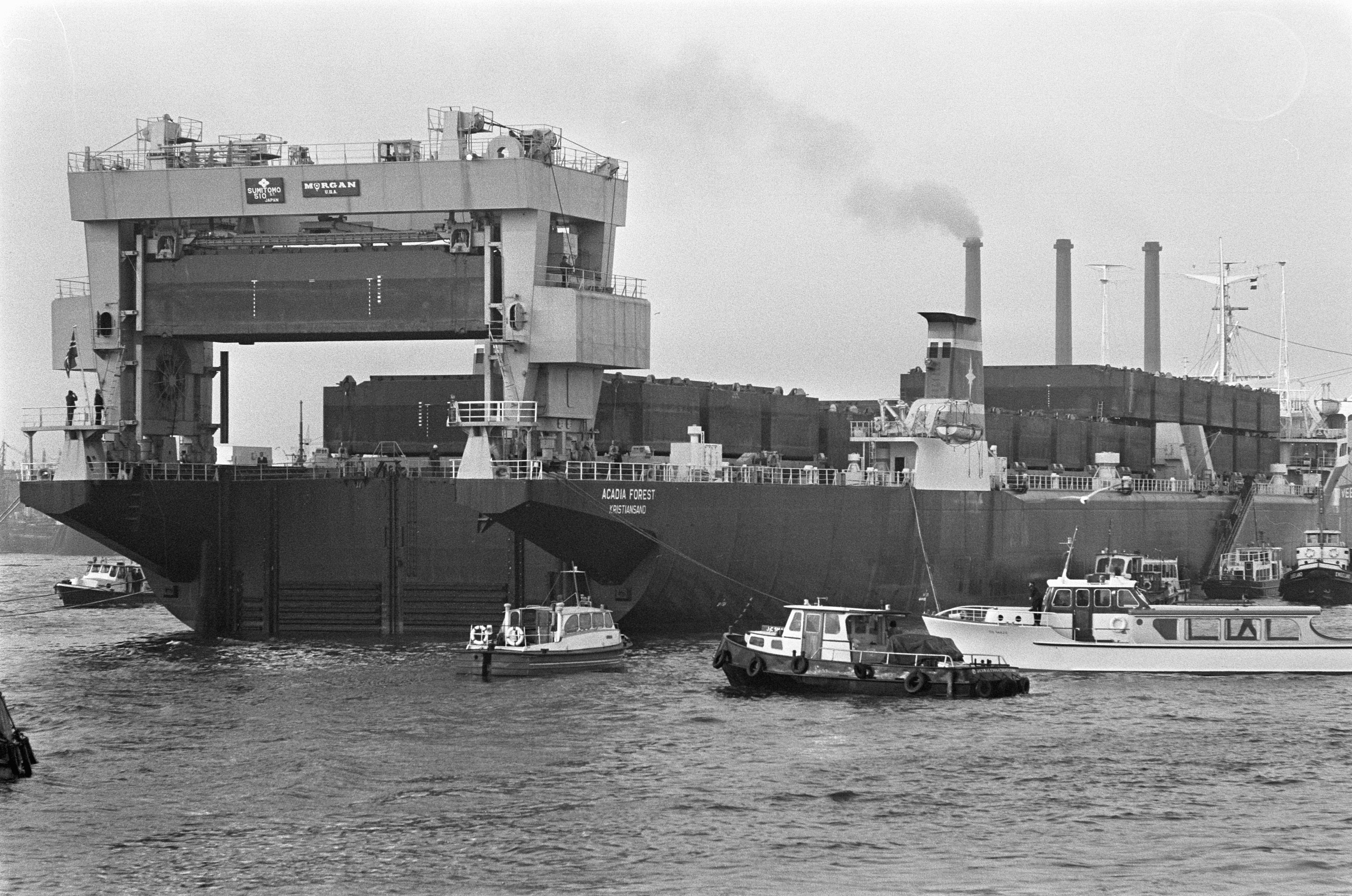 Collectie / Archief : Fotocollectie Anefo Reportage / Serie : [ onbekend ] Beschrijving : Eerste "Kangoeroeschip" Acadia Forest wordt gelost in Rotterdam Datum : 2 december 1969 Fotograaf : Behrens, Herbert / Anefo Auteursrechthebbende : Nationaal Archief Materiaalsoort : Negatief (zwart/wit) Nummer archiefinventaris : bekijk toegang 2.24.01.05 Bestanddeelnummer : 923-0448